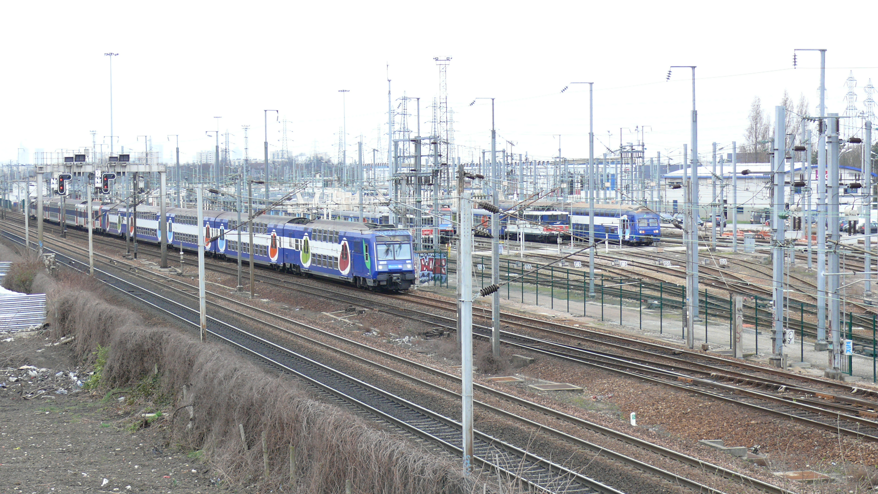 Les installations du Technicentre Paris-Nord (Dépôt des Joncherolles vues depuis le "Pont de Creil" sur la RN1 à PierrefitteAu premier plan, les 4 voies de la ligne Paris-Lille